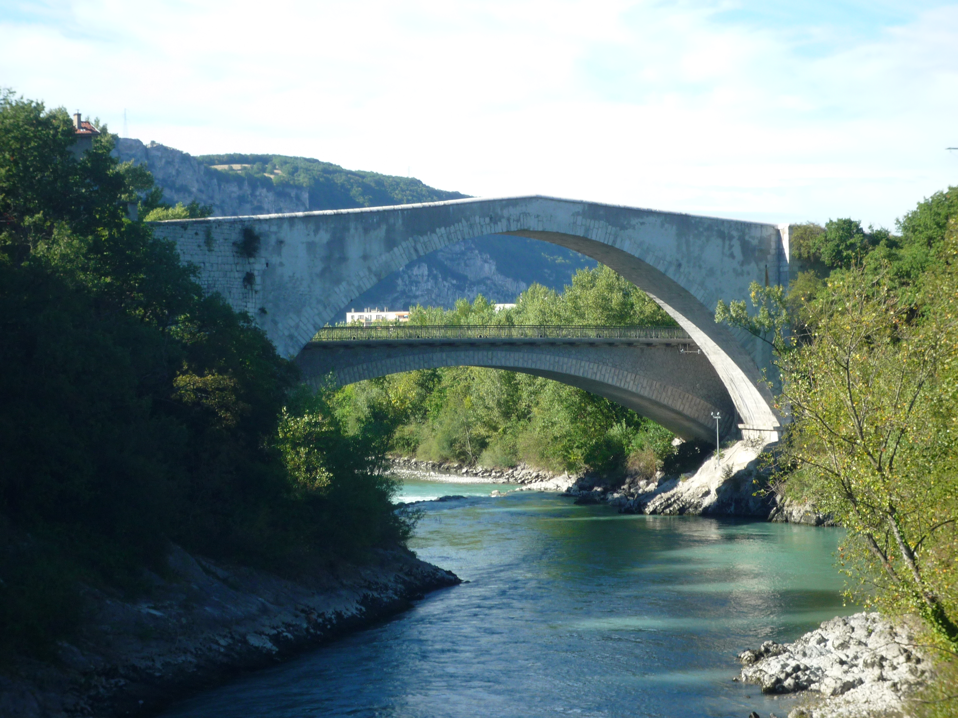 Pont Lesdiguières (1624) entre Pont-de-Claix et Claix, Isère.